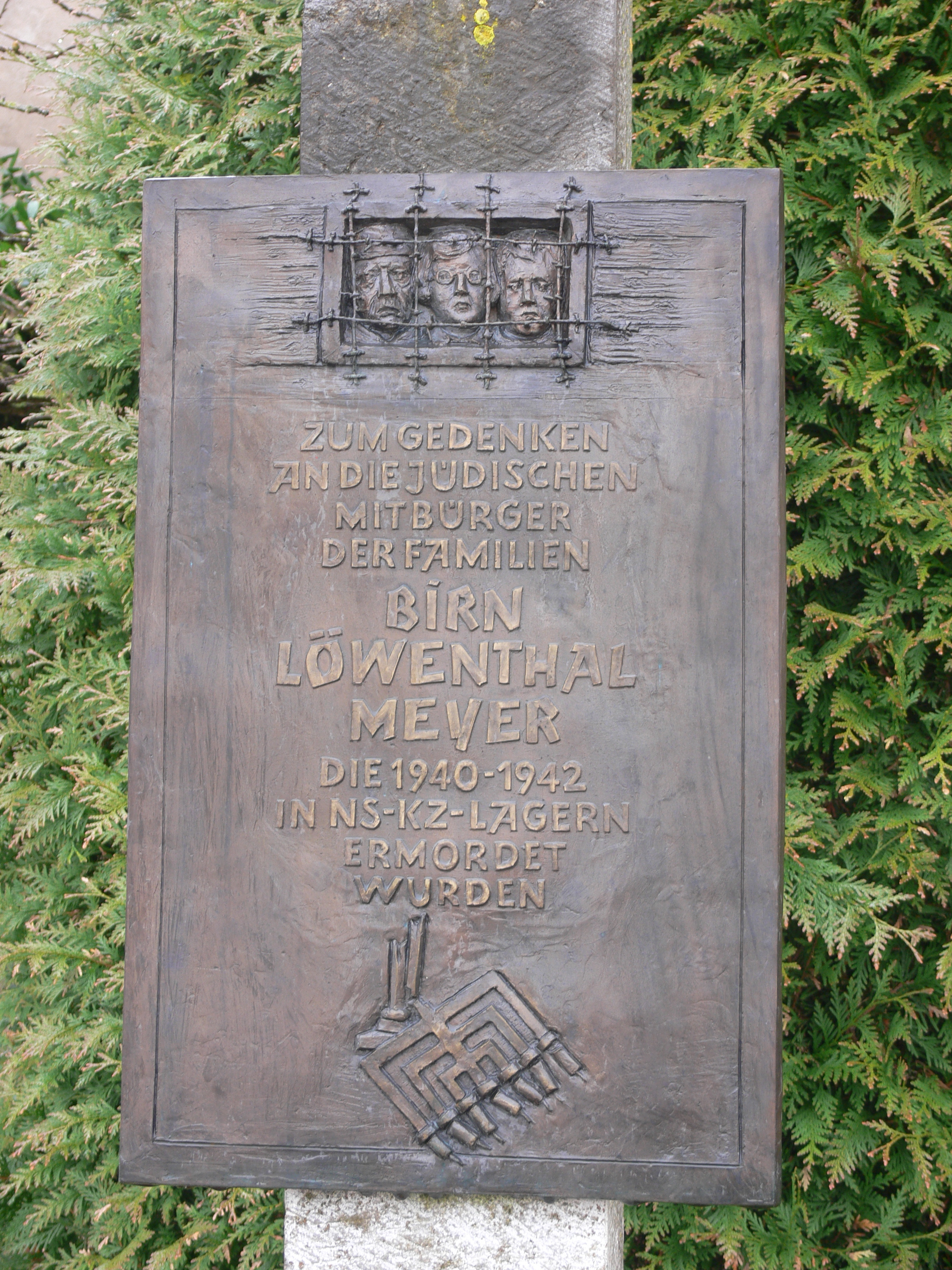 Tafel der Erinnerungssteele am ehemaligen Standort der Synagoge (jetzt Parkplatz Edeka-Markt), Bäckerstraße 14, Estenfeld, Unterfranken, Bayern, Deutschland